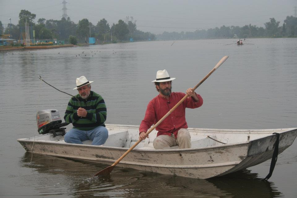 Fotografía de Marco Rascón y Daniel Giménez Cacho durante la grabación del capítulo 13 de la serie En Materia de Pescado. Se encuentran en el canal de Cuemanco en México, Distrito Federal